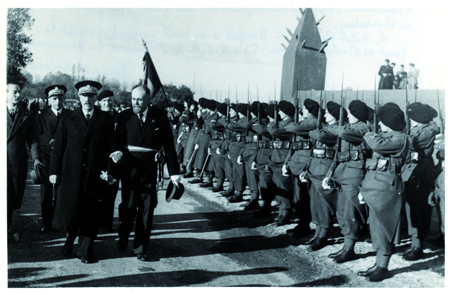 ADRML, 437 W 173